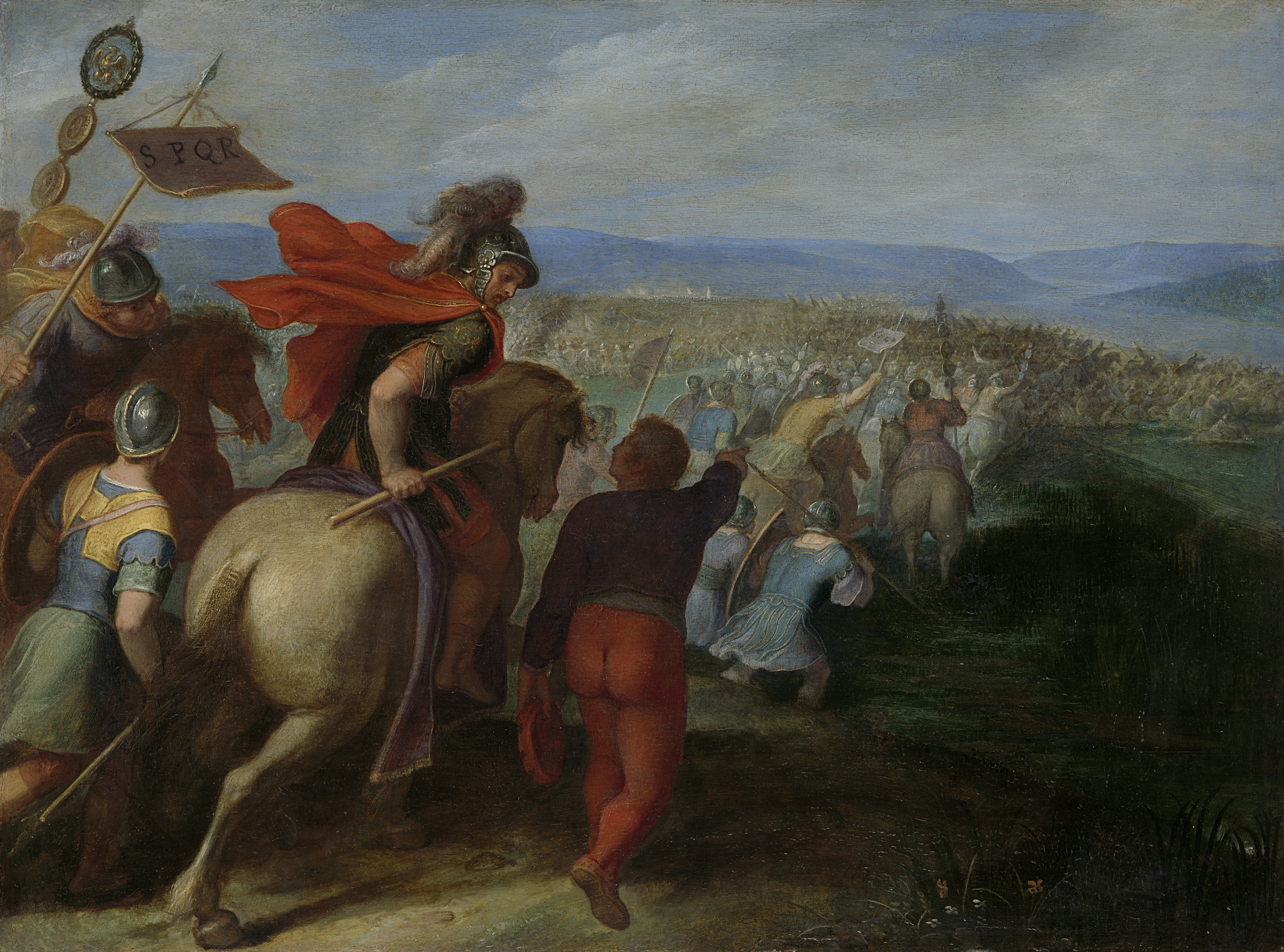 De Romeinen onder Cerealis verslaan Claudius Civilis door het verraad van een Batavier. Een man verraadt de Batavieren aan een Romeinse officier te paard in het oprukkende leger. Elfde voorstelling in een reeks van twaalf taferelen van de opstand van de Batavieren tegen de Romeinen (SK-A-421/432), aangekocht door de Staten-Generaal in 1613.